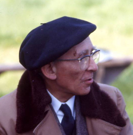 Henri Romagnesi photographié par J.-J. Wuilbaut